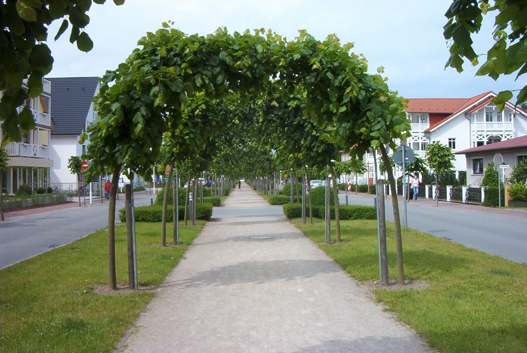 Baabe auf Rügen, Promenade auf der Hauptstraße